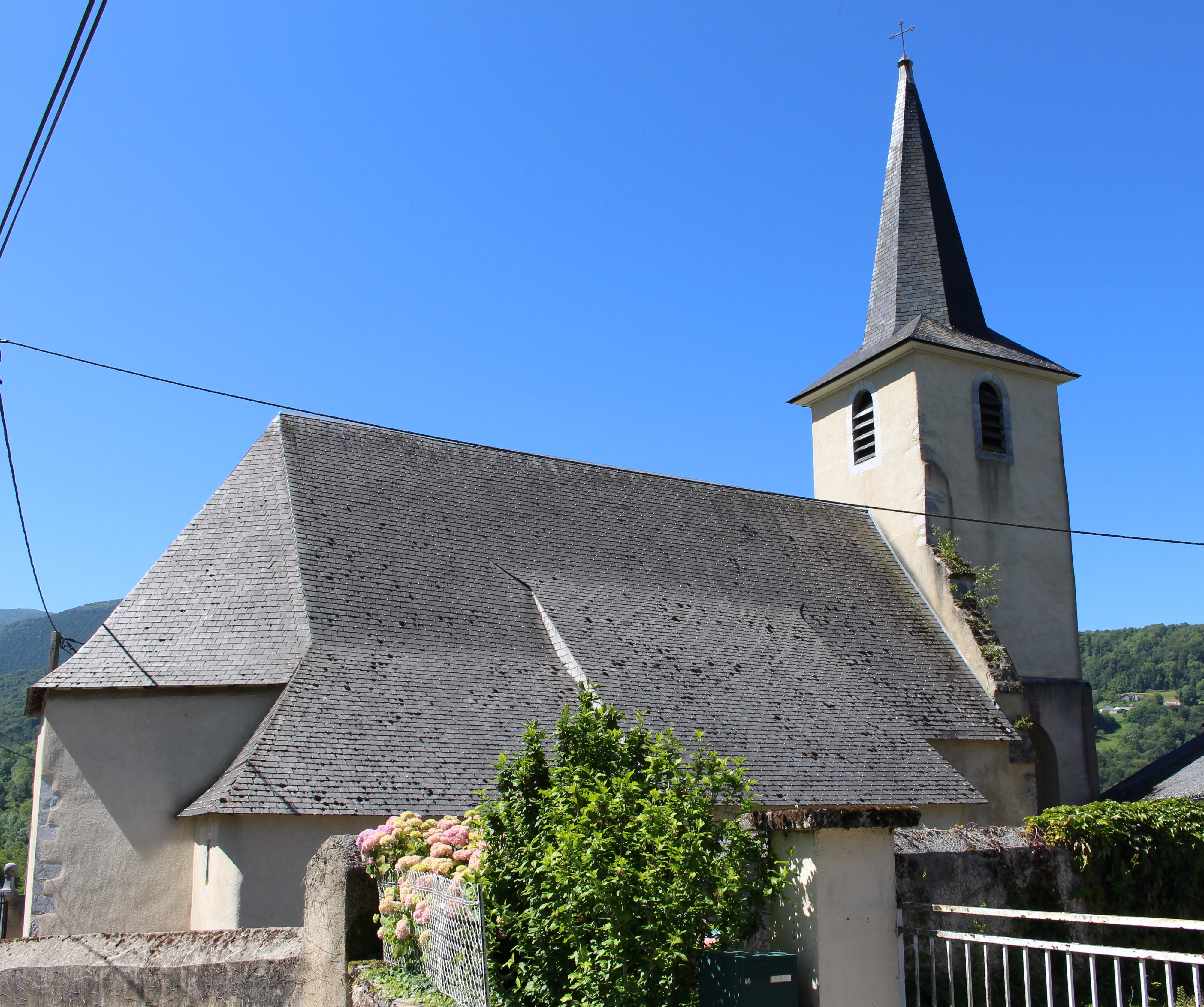 Église de l'Assomption de Lies (Hautes-Pyrénées)